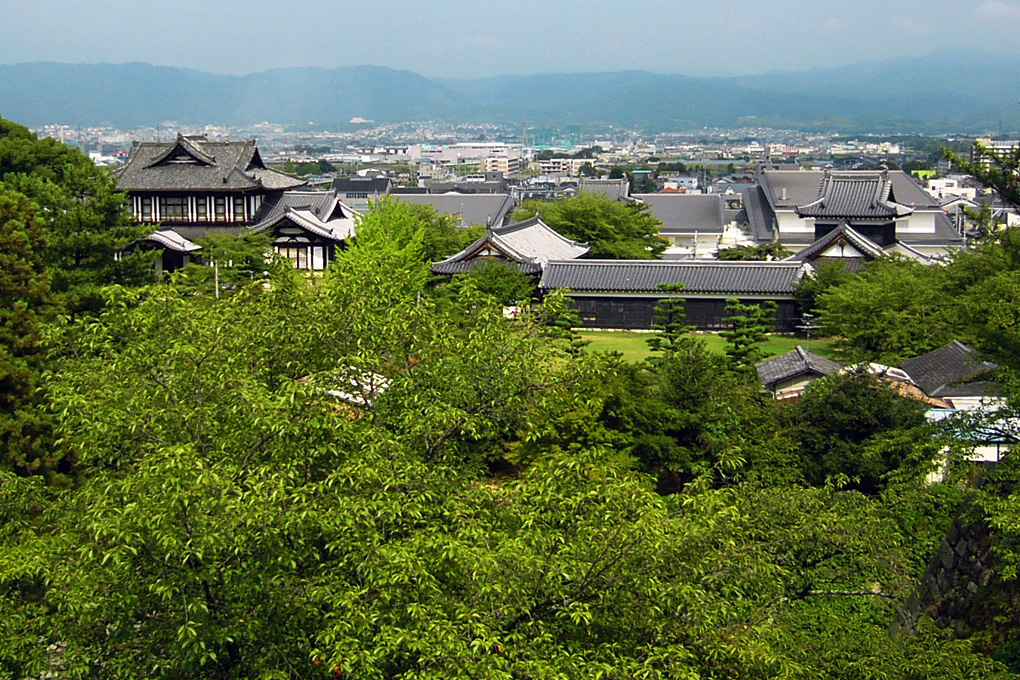 Koriyama Castle in Yamatokoriyama, Nara